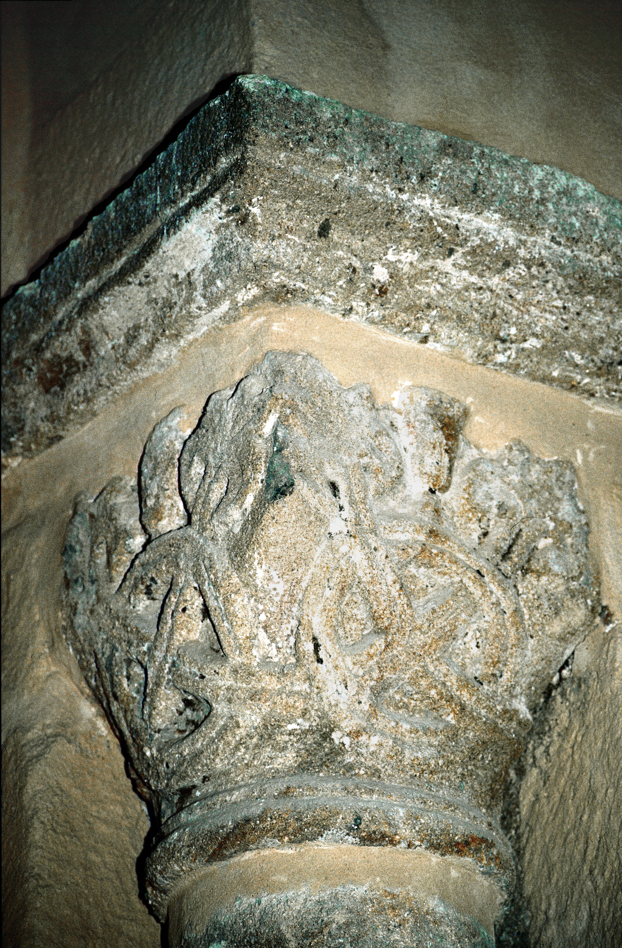 Saint-Romain-le-Puy: Kapitell in St. Michel